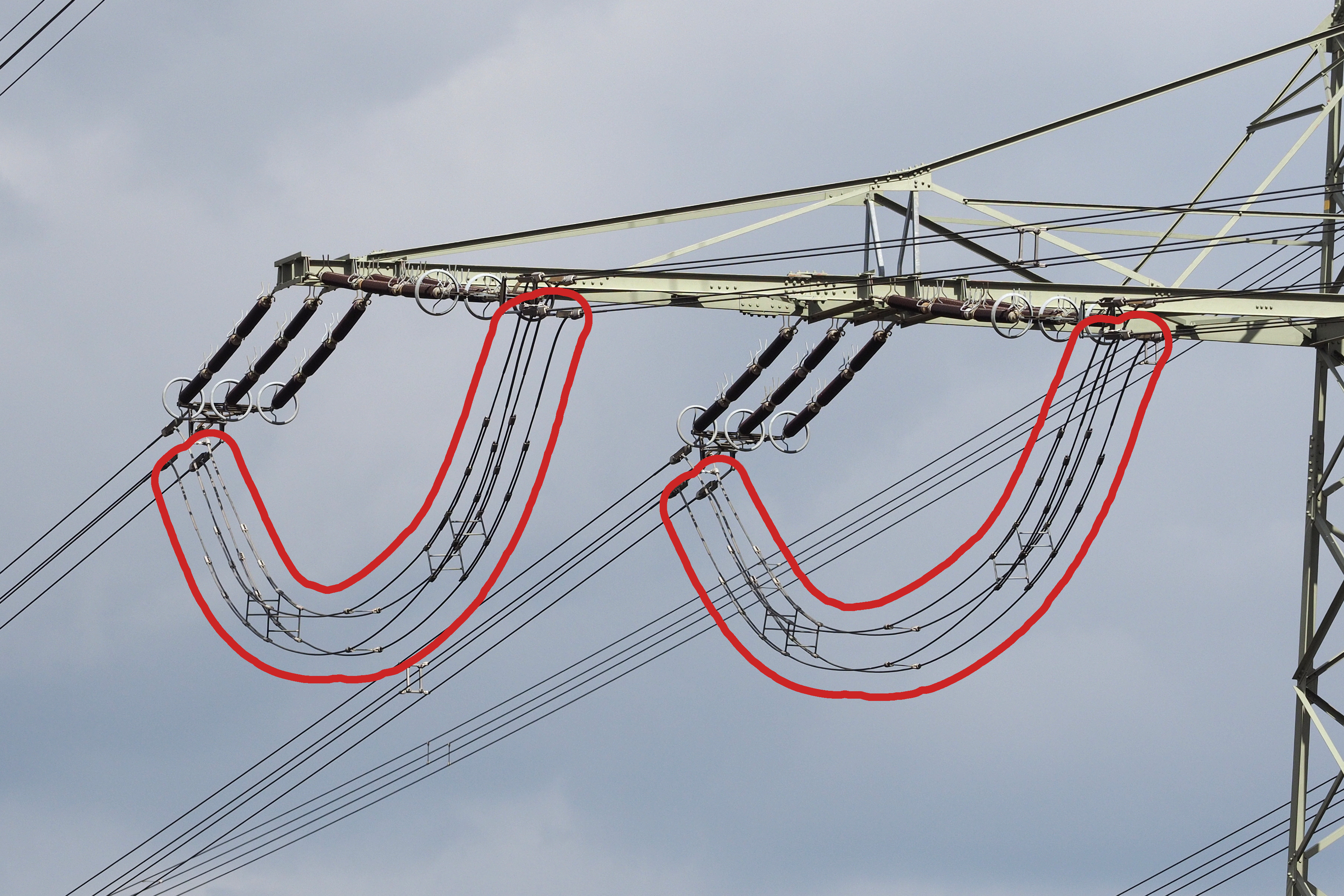 Stromschlaufen an einem Freileitungsmast (380-kV-Leitung Bürstadt–Hoheneck, Bl. 4523, Mast bei Mannheim-Seckenheim)